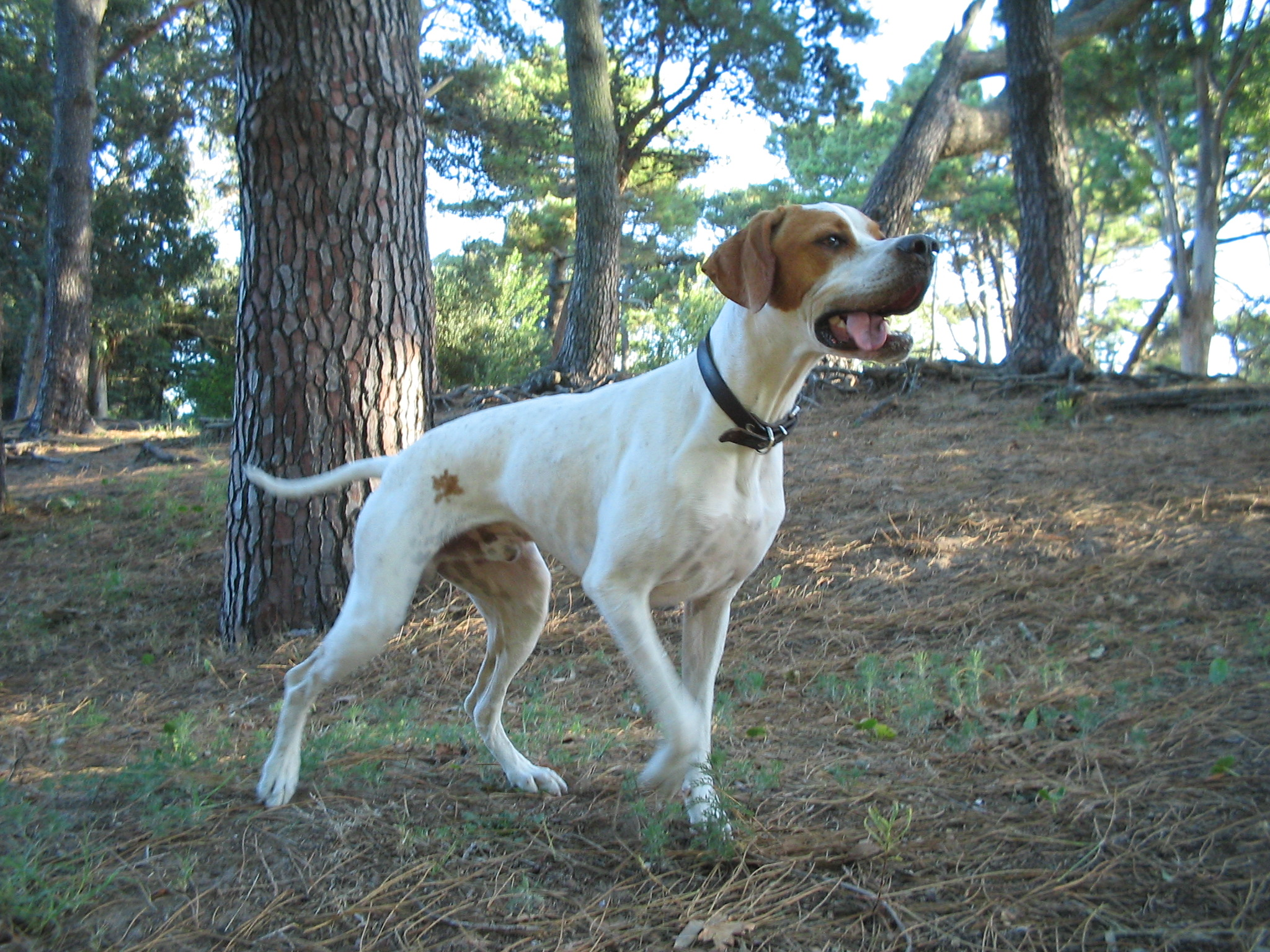 Pointer (dog breed)